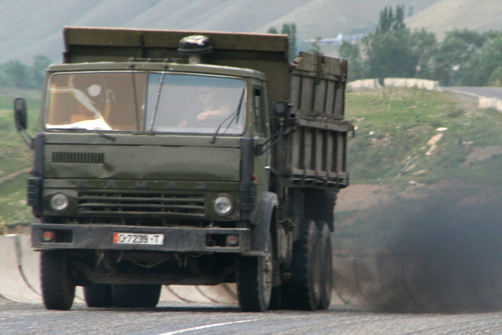 Landwirtschaftlicher Kipper KamAZ-55102 in Kirgisistan.